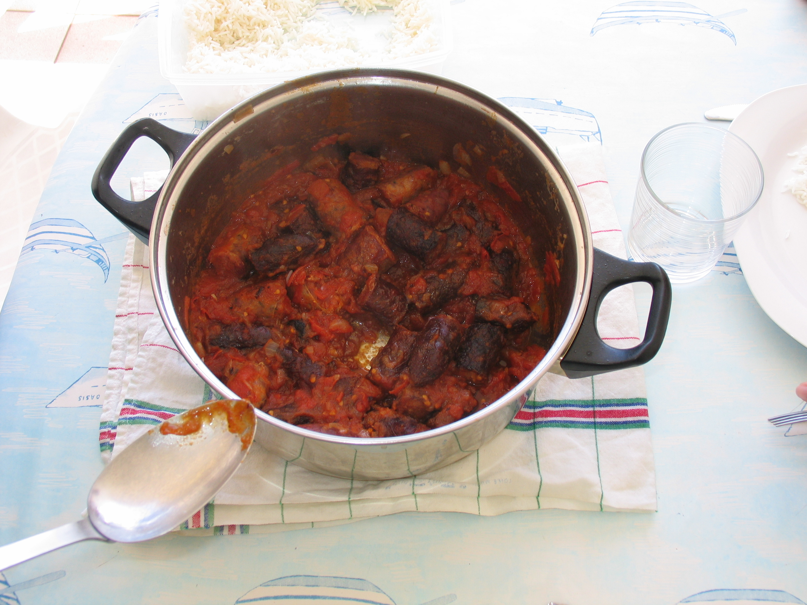 Plat de la cuisine réunionaise